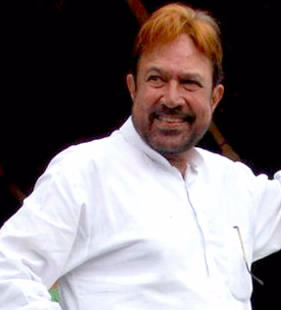 Rajesh Khanna at 'Ghatkopar Dahi Handi' celebrations